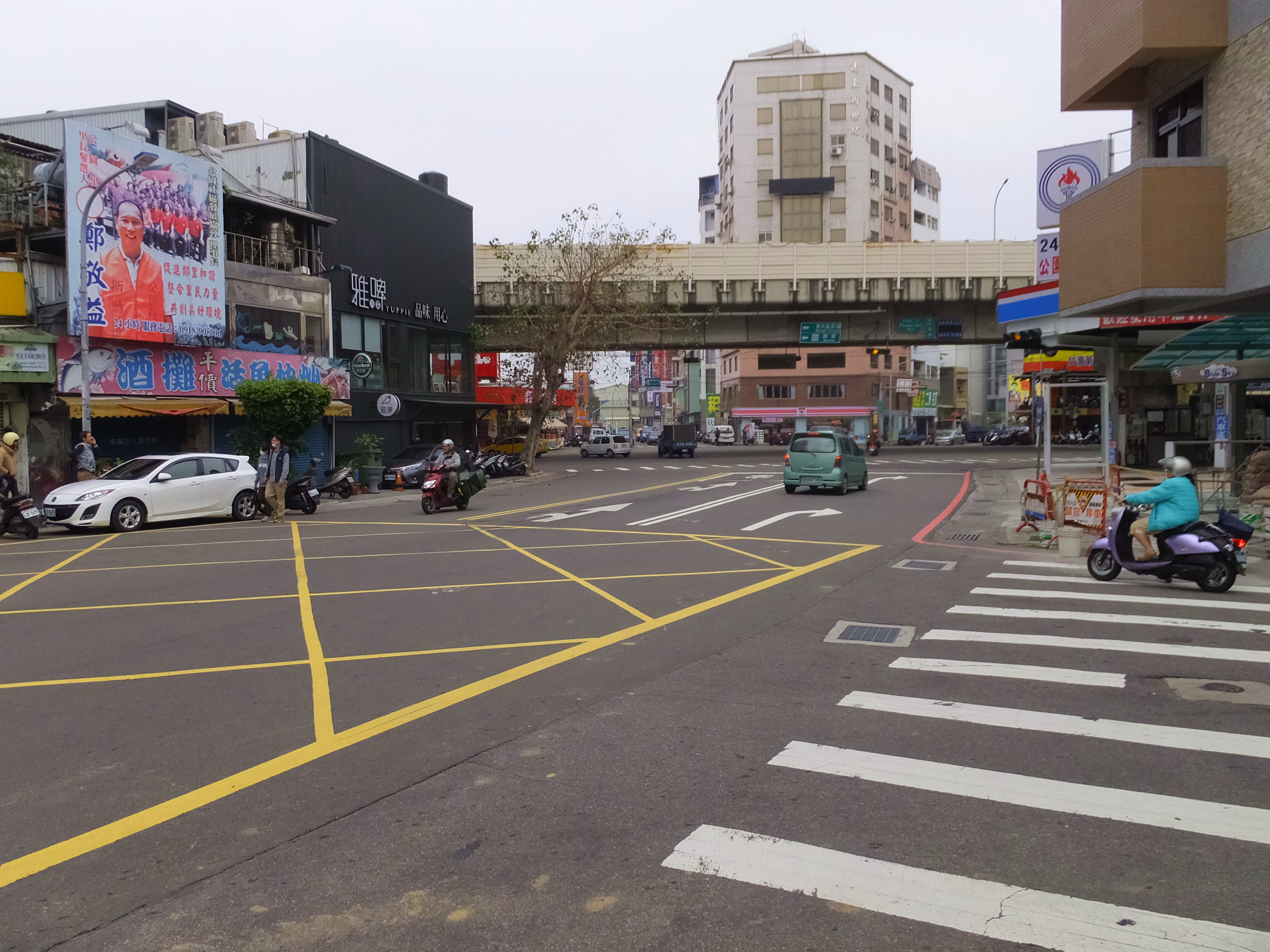 新竹市公園路